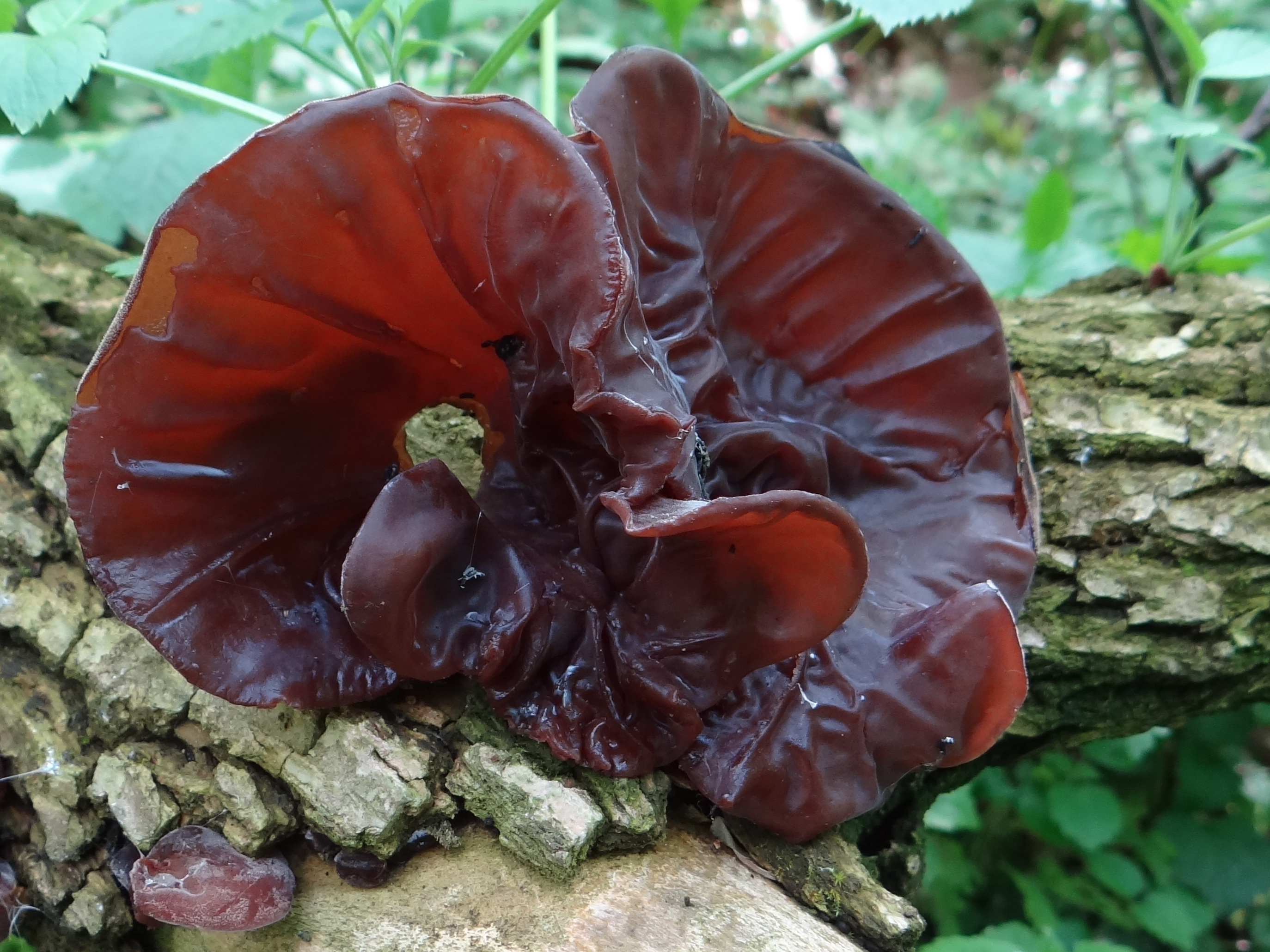 Auricularia auricula-judae (location: Poland, Łapanów)